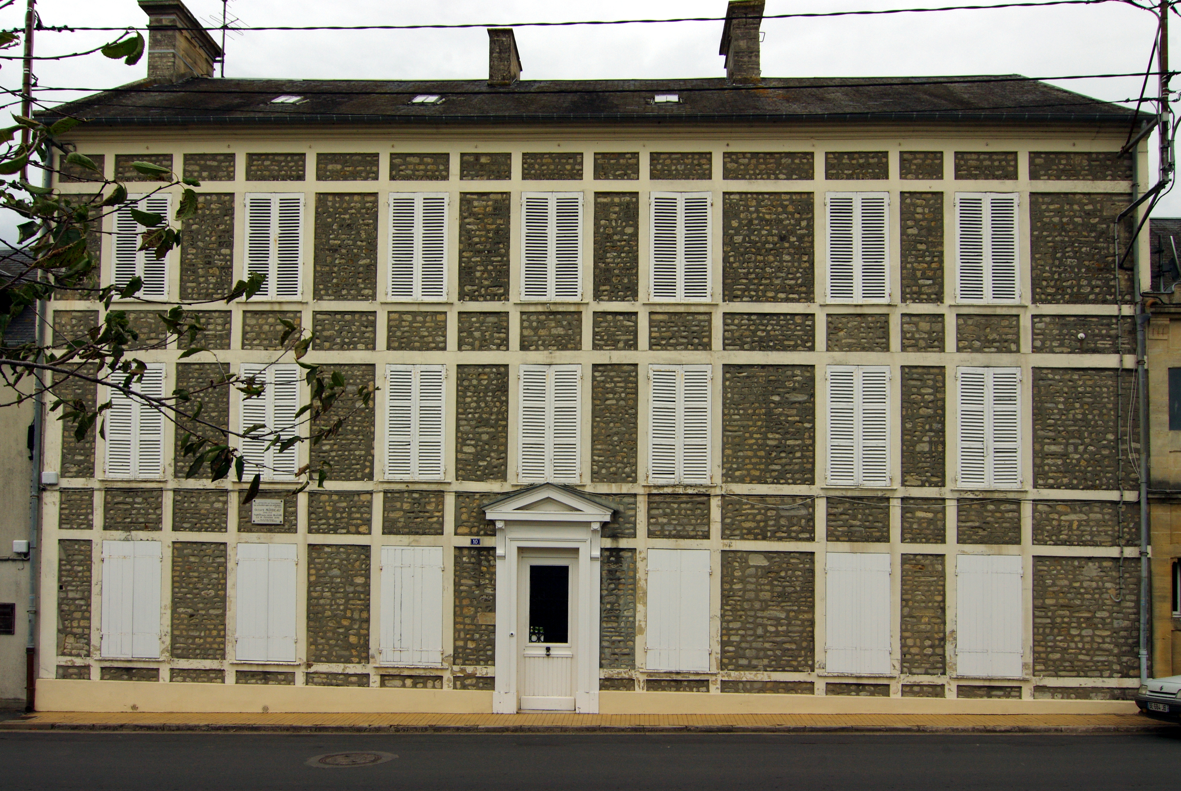 La maison natale d'Octave Mirbeau, Trévières Calvados.